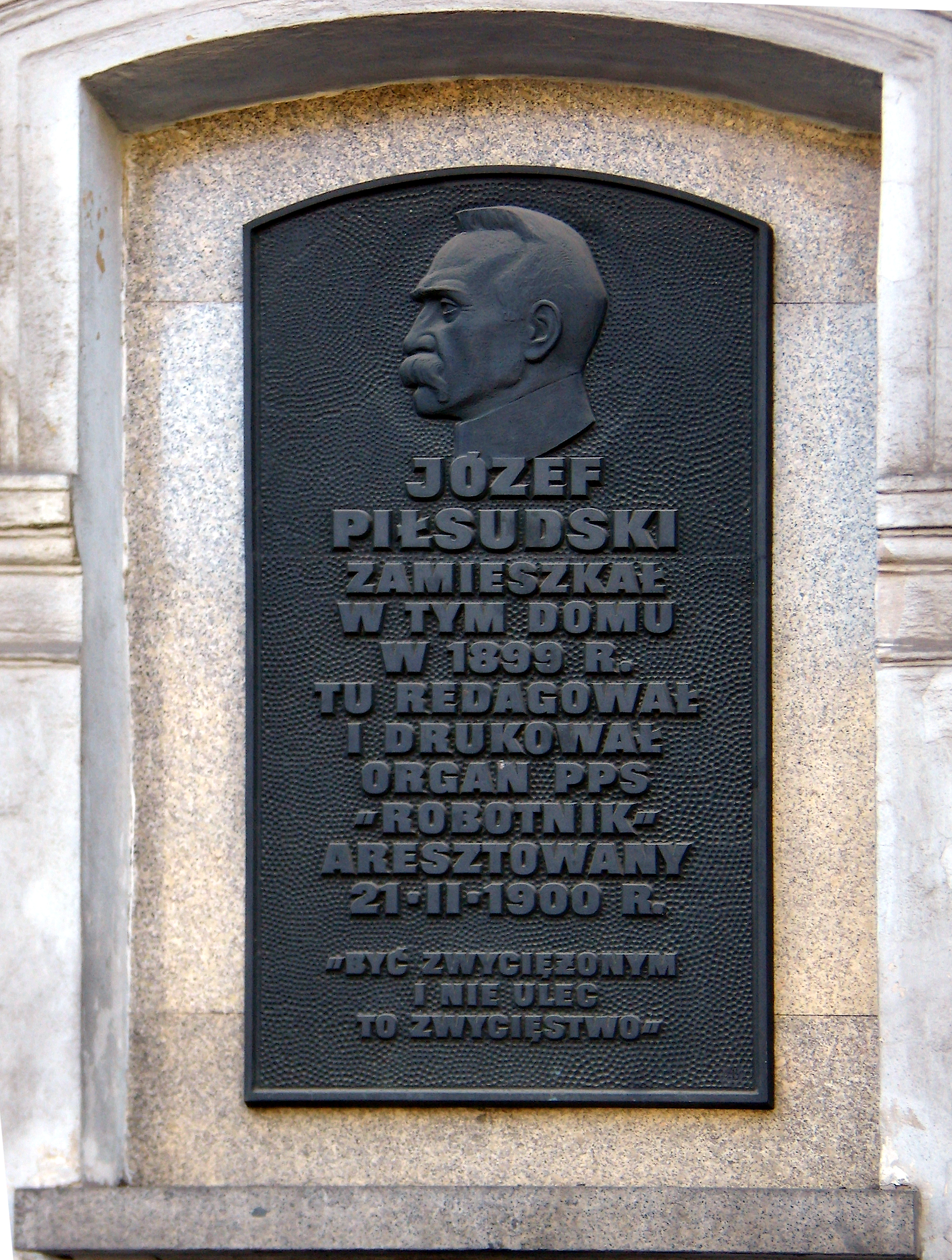 Łódź, ul. Wschodnia 19, tablica ku czci Józefa Piłsudskiego